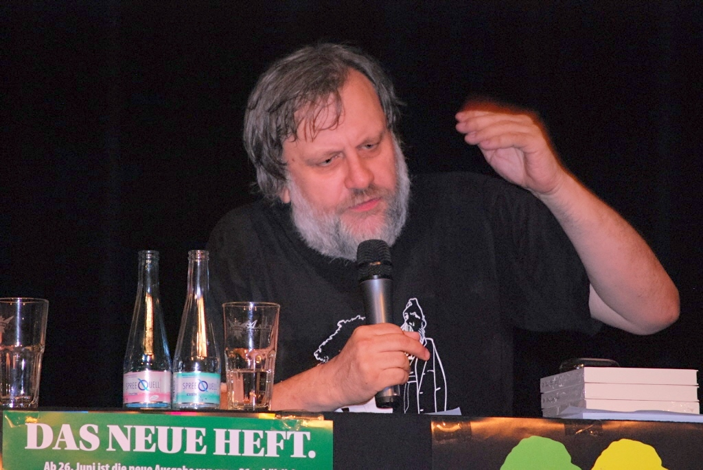 Foto: Gisbert H. Drignat